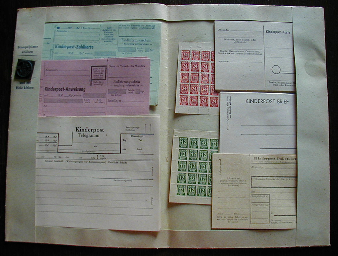 Kinderpost